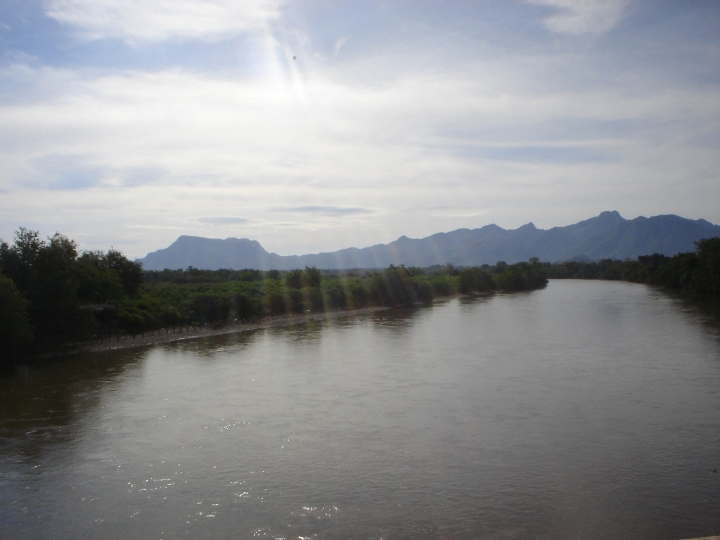 Vista del Río Balsas desde el Puente Miguel Alemán en Coyuca de Catalán, Guerrero.